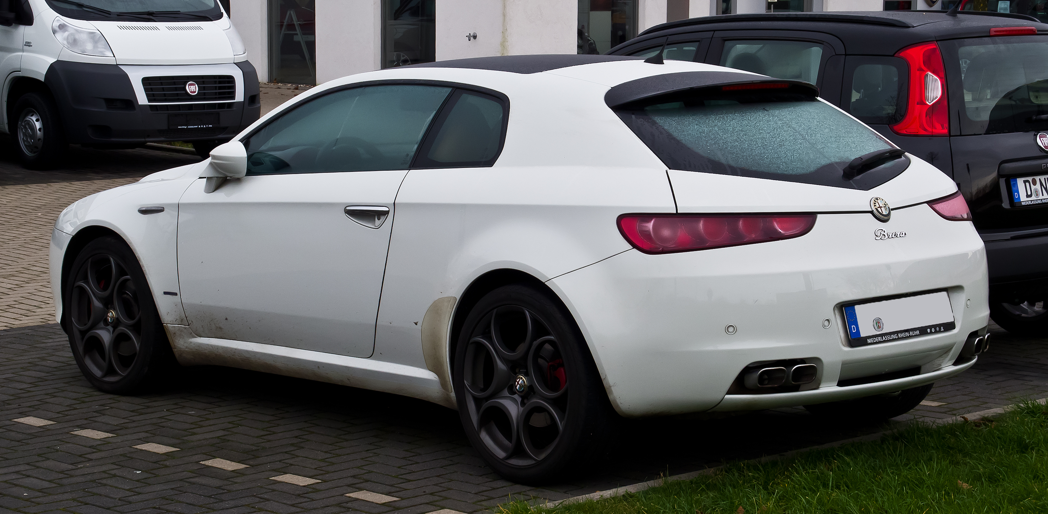 Alfa Romeo Brera (939)